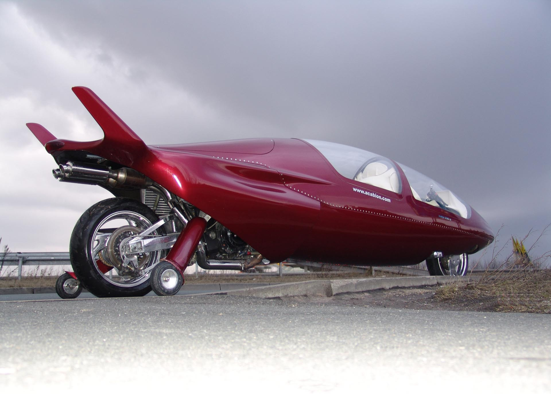 Bildbeschreibung: Acabion GTBO, fotografiert an der A9 Quelle: Acabion TM Stuttgart Fotograf: Peter Maskus Datum: 25. März 2006